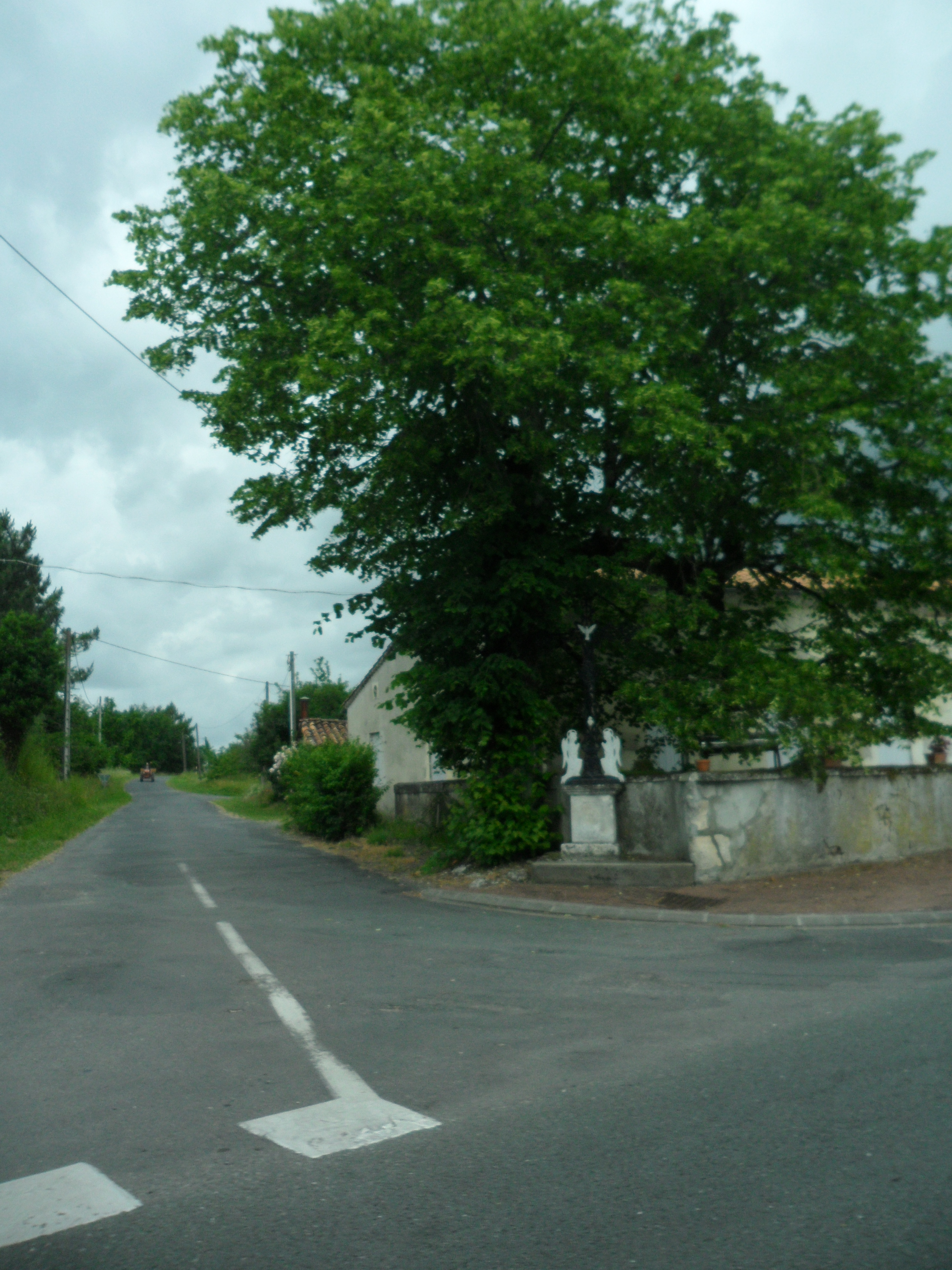 Le Fouilloux, Charente-Maritime